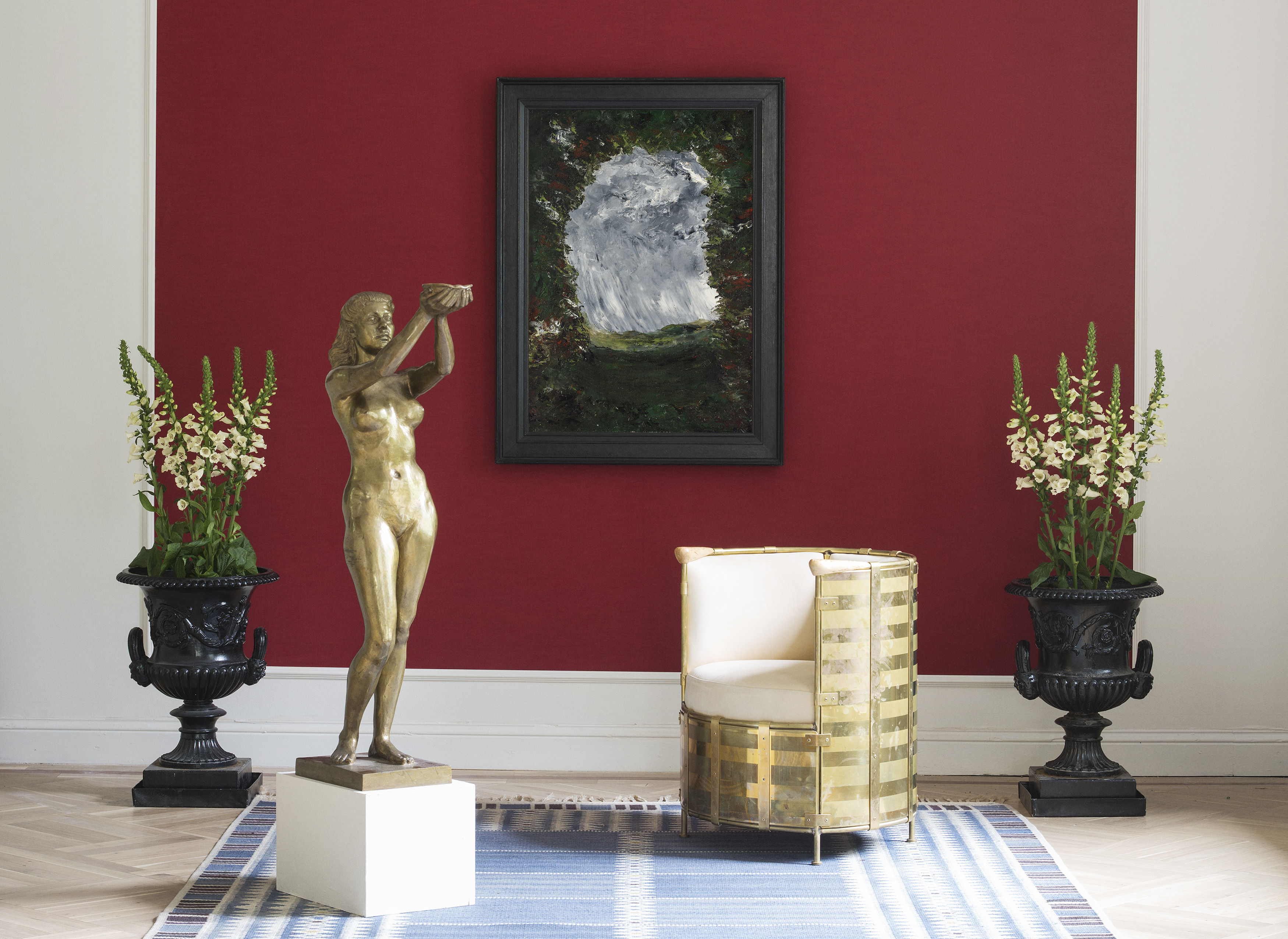 Bukowskis - konst och design av kvalitet